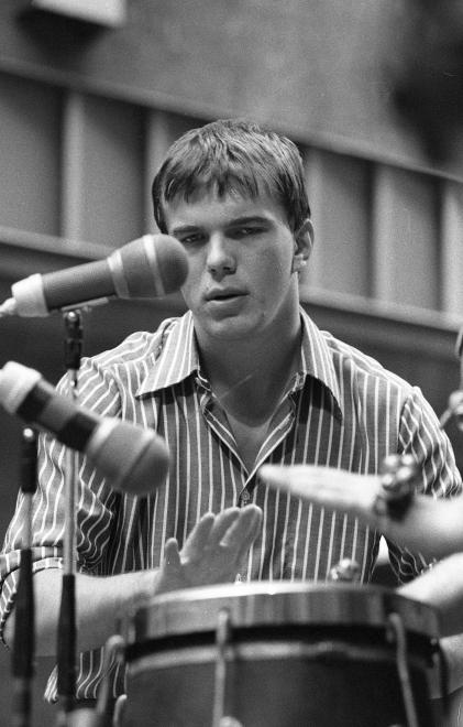 Bubik István (Budapest V., a VIT-utca rendezvénysorozat egyik helyszíne)